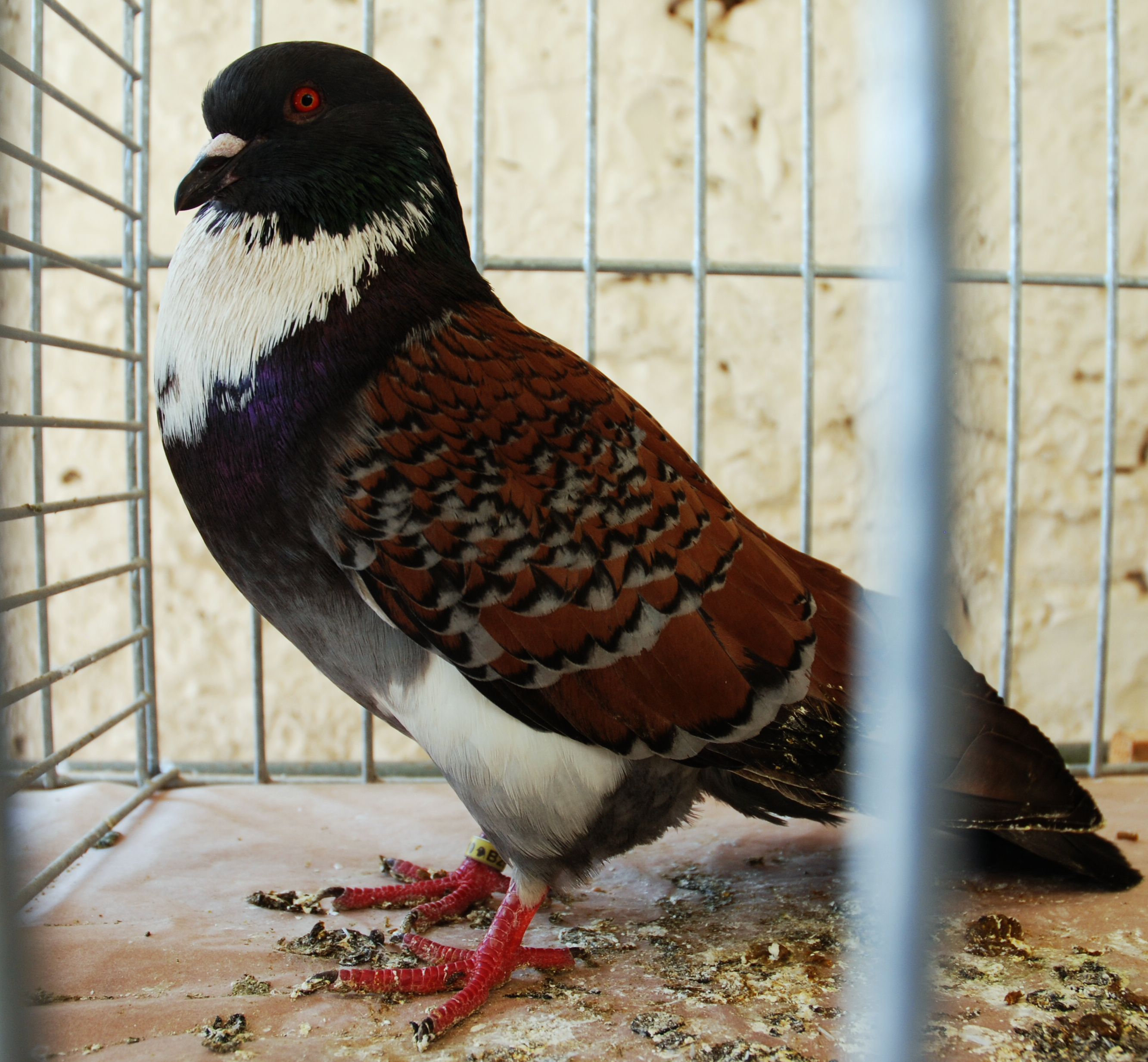 holub plemene košoa